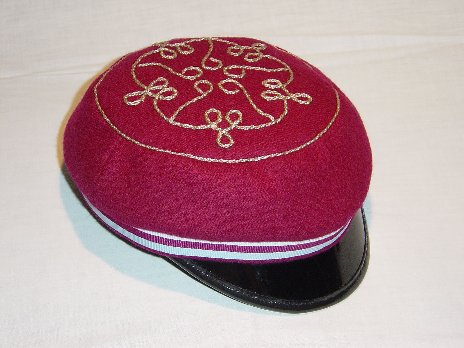 Dekiel K! Magna-Polonia z Poznania.